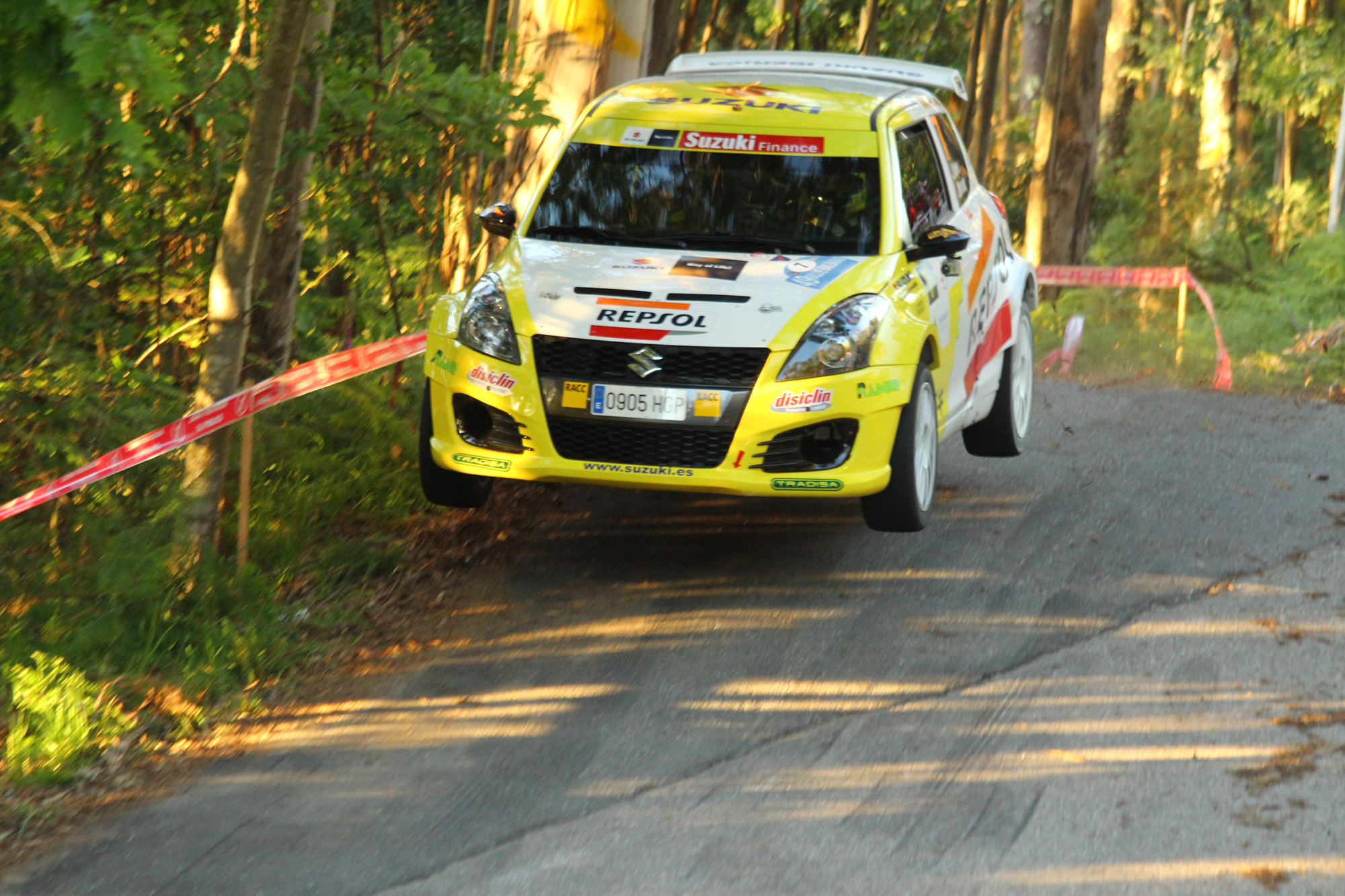 Rally Rias Baixas 2013 (Joan Vinyes)